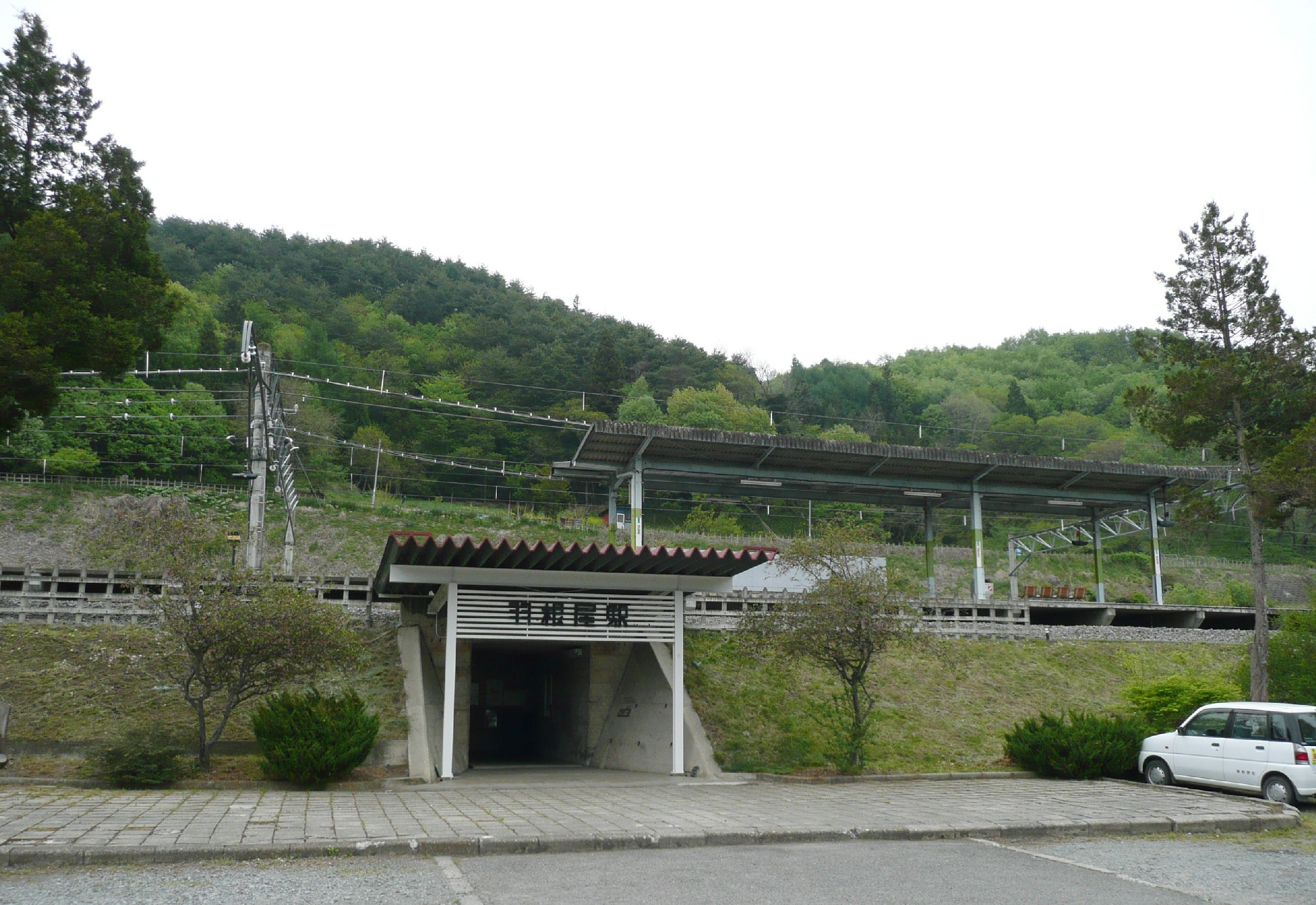 羽根尾駅